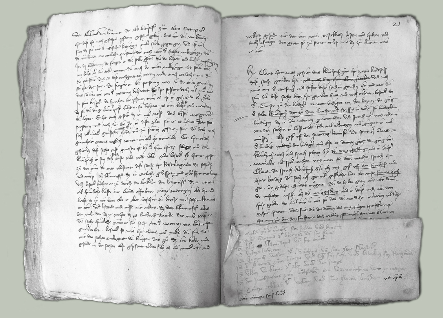 Aktenseite des Straßburger Waldenserprozesses: AVCUS, VI 699/1 fol. 21r. mit dem Gericht von Klaus von Brumath ausgehändigten Verdächtigtenliste (unten rechts angeklebt)